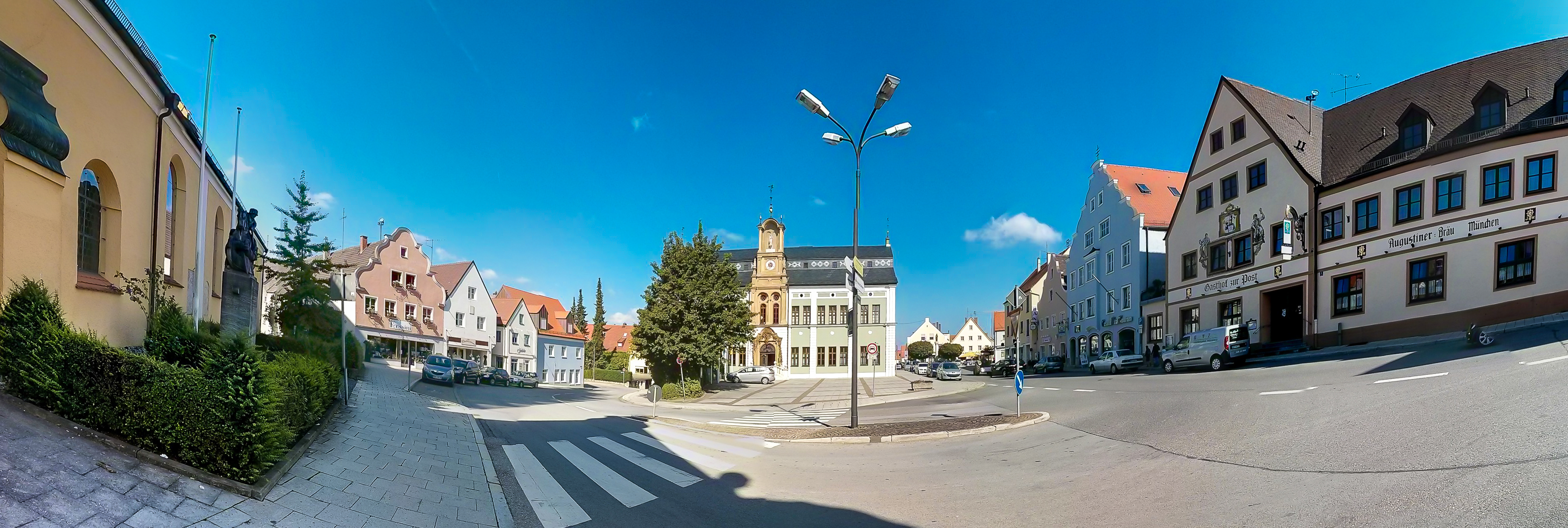 Umgrenzung: Marktplatz 1-10: Der annähernd quadratische Marktplatz wird im Süden von der Pfarrkirche, im Norden vom Rathaus und an den beiden übrigen Seiten von meist zweigeschossigen, zum Teil mit Schweifgiebeln versehenen Häusern des 18./19. Jahrhunderts begrenzt.This is a photograph of an architectural monument.